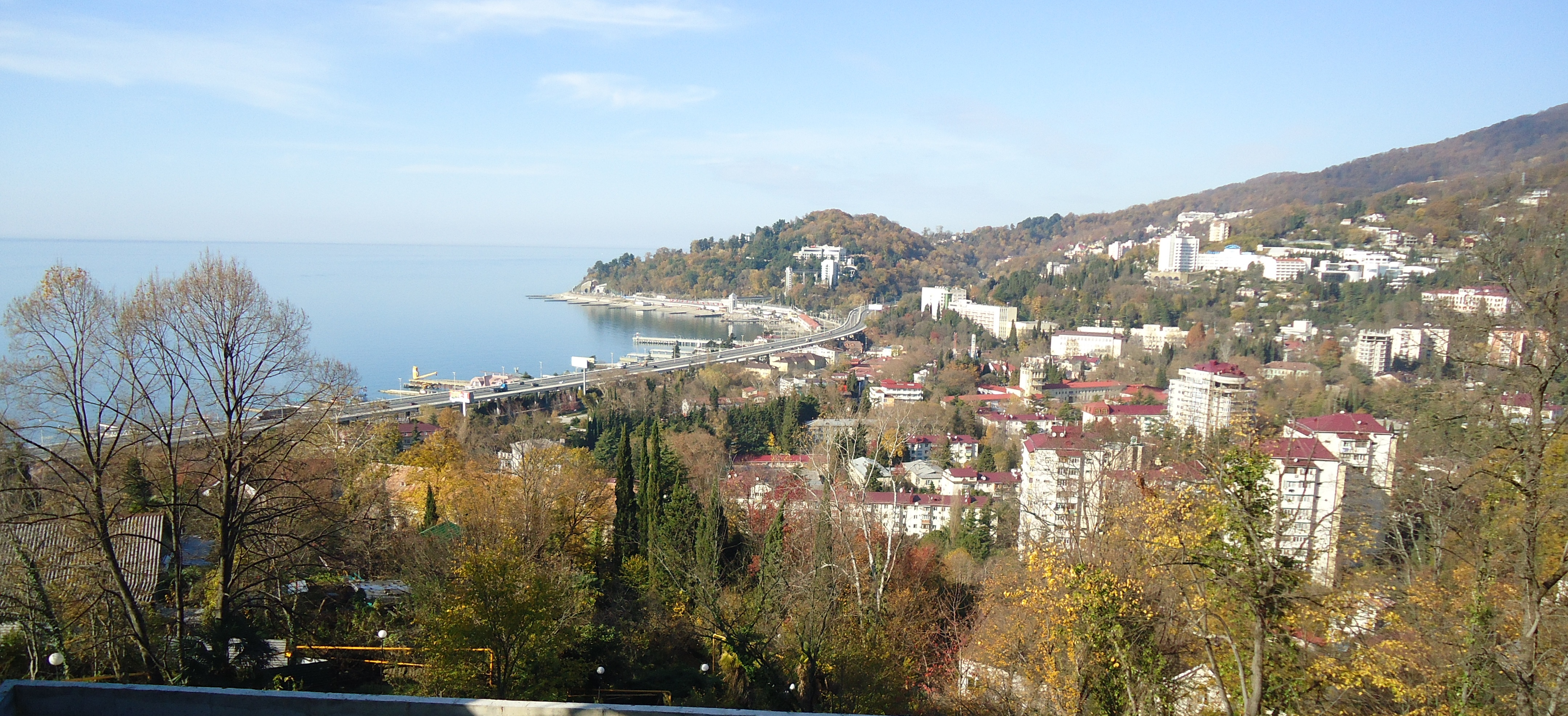 Вид на Хосту со старой дороги Хоста-Кудепста